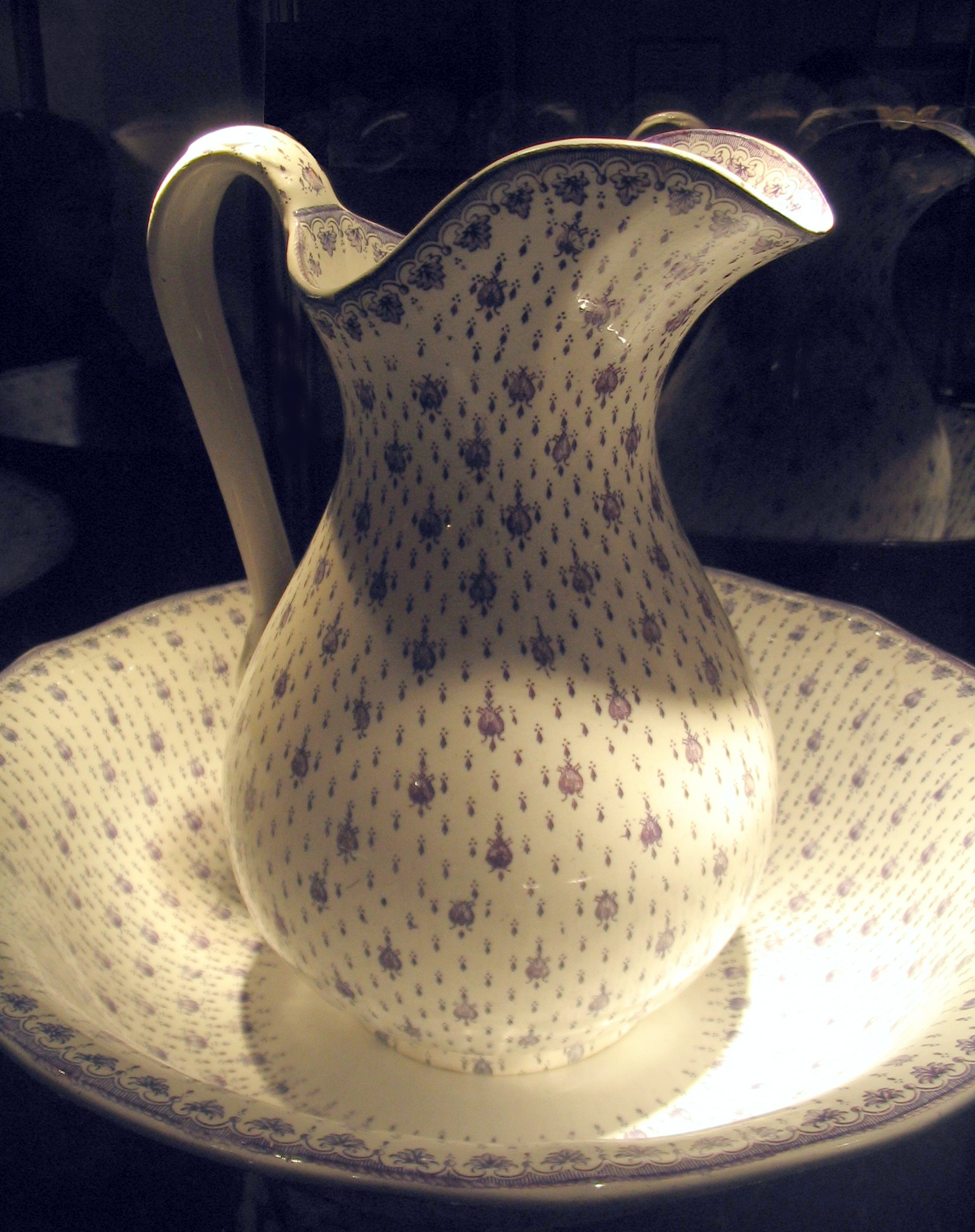 Wasserkrug und Waschschüssel, Creil-Montereau. Musée Gallet-Juillet, Creil, France.